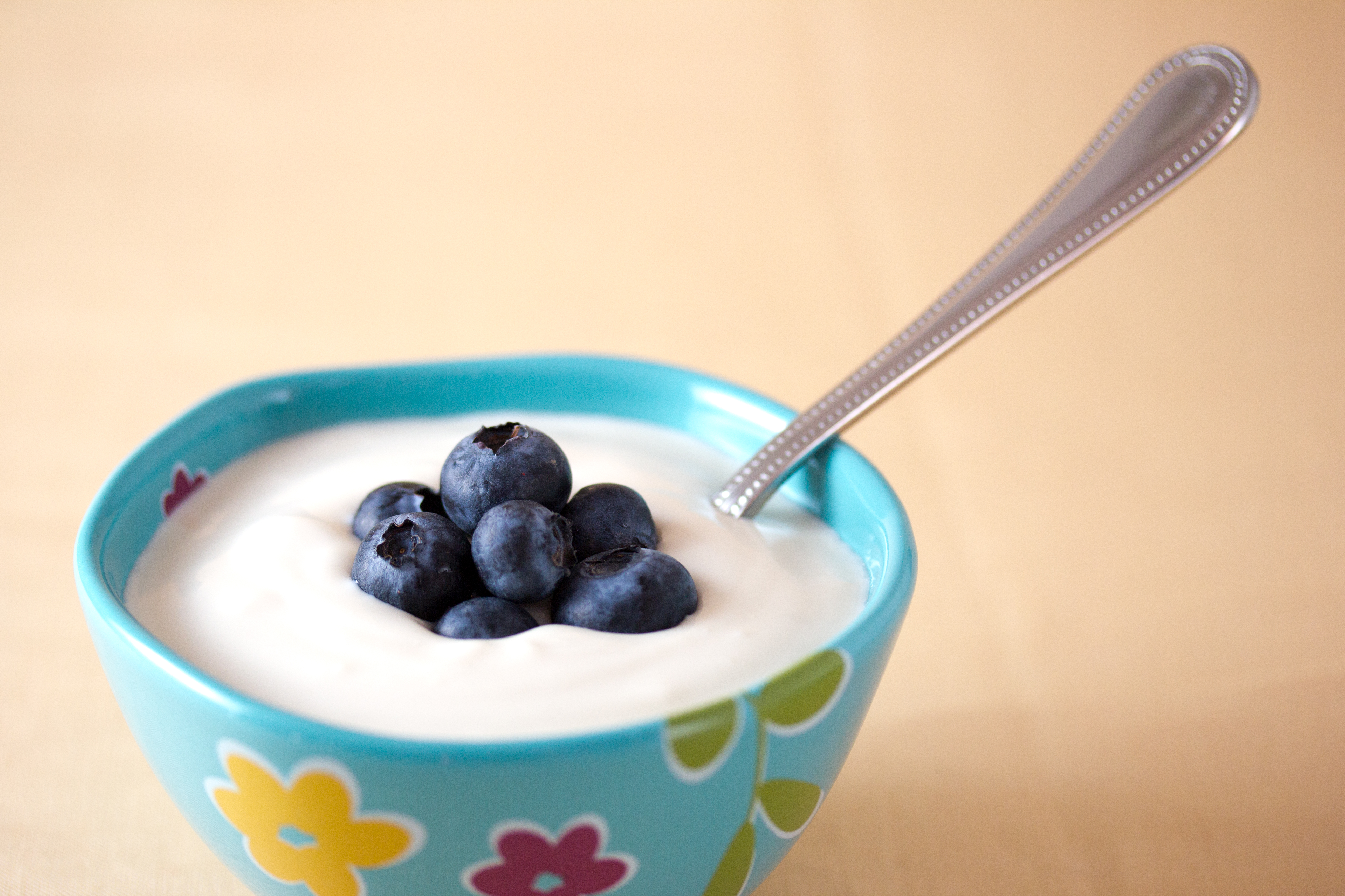 Vegan yogurt